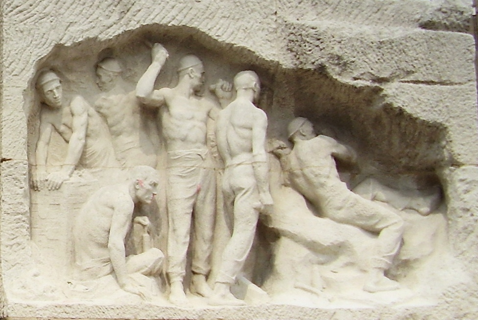 Description: Monument au Travail, Bruxelles - La Mine, Constantin Meunier Author: User:Ben2 Date of creation: 20 juin 2006 Source: Photo personnelle